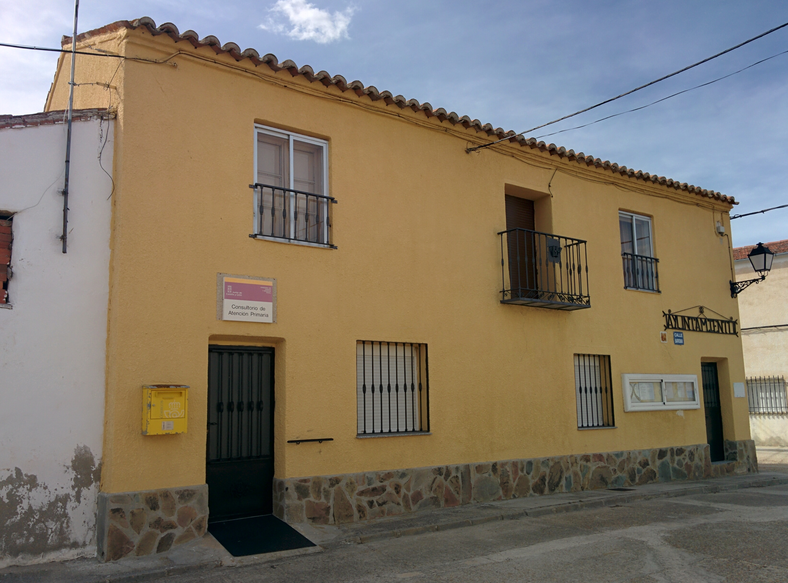 Casa consistorial de Castellanos de Zapardiel (Ávila, España).